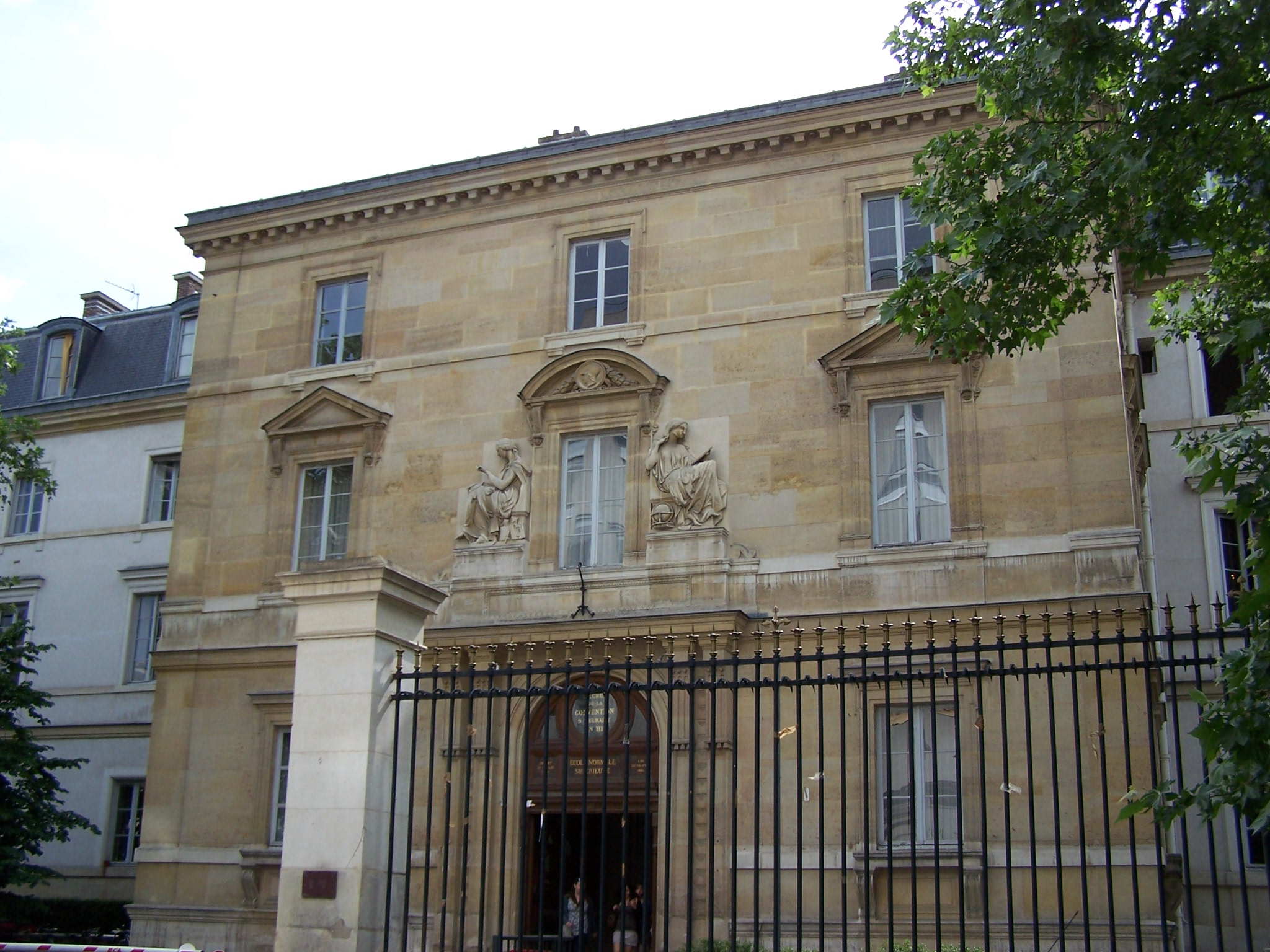 Entrée principale de l'école normale supérieur - Ulm, au 45 rue d'Ulm à Paris